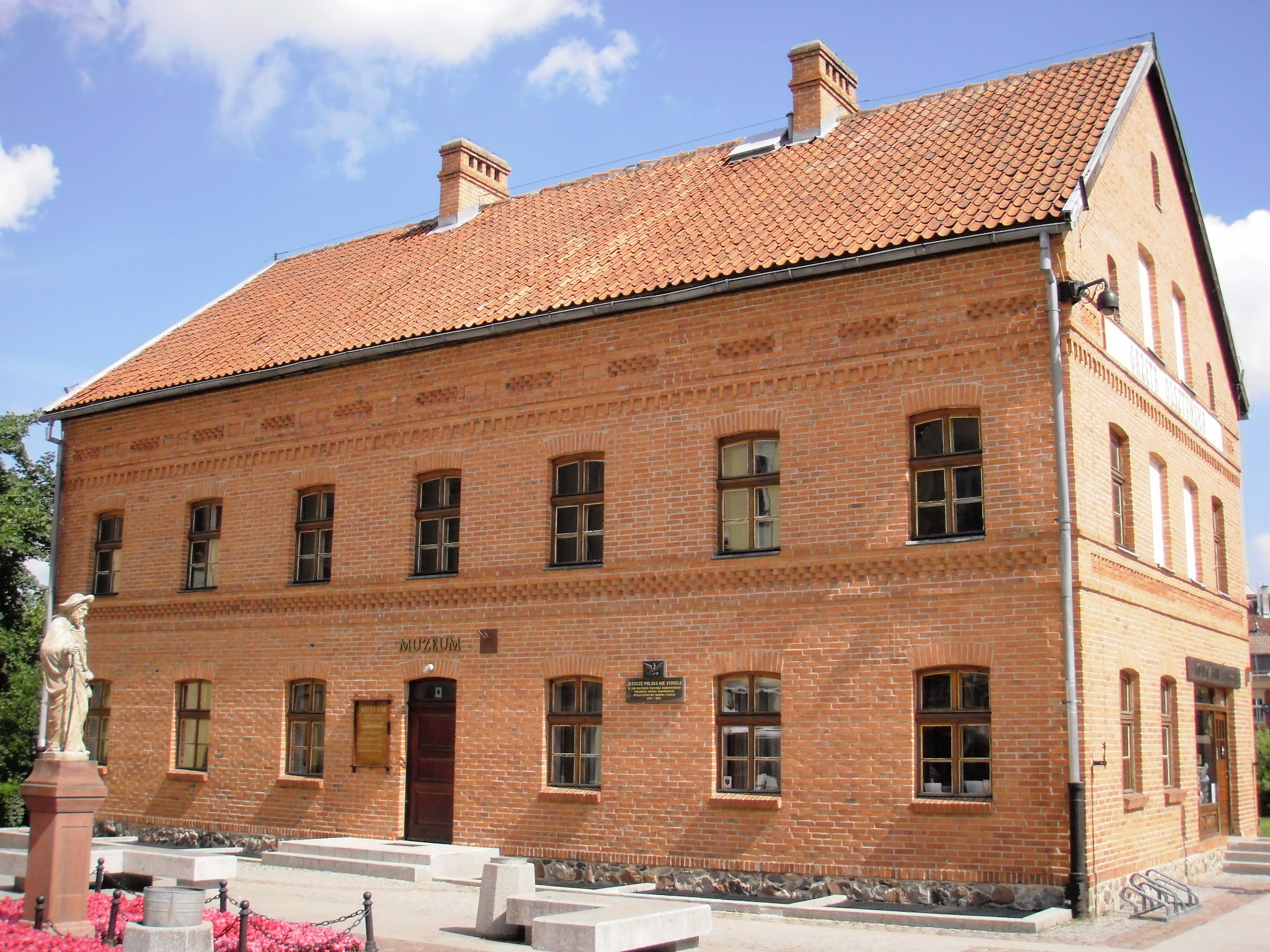 Olsztyn, dom redakcji "Gazety Olsztyńskiej", 1987-1989